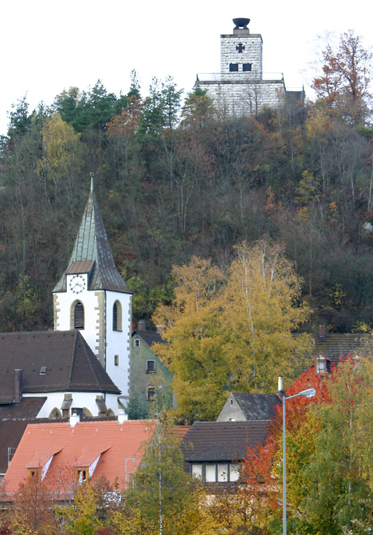 Ehrenmal über dem Stadtteil Rosenberg. Wurde auf den Resten des Burgturms der "Rosenburg" errichtet, die der Gemeinde einst den Namen gab. Unterhalb des Ehrenmals steht die Pfarrkirche St. Johannes Baptist. Copyright Status: GNU Freie Dokumentationslizenz Originalgröße: 3072 x 2048 (Ausschnitt, für Web skaliert)